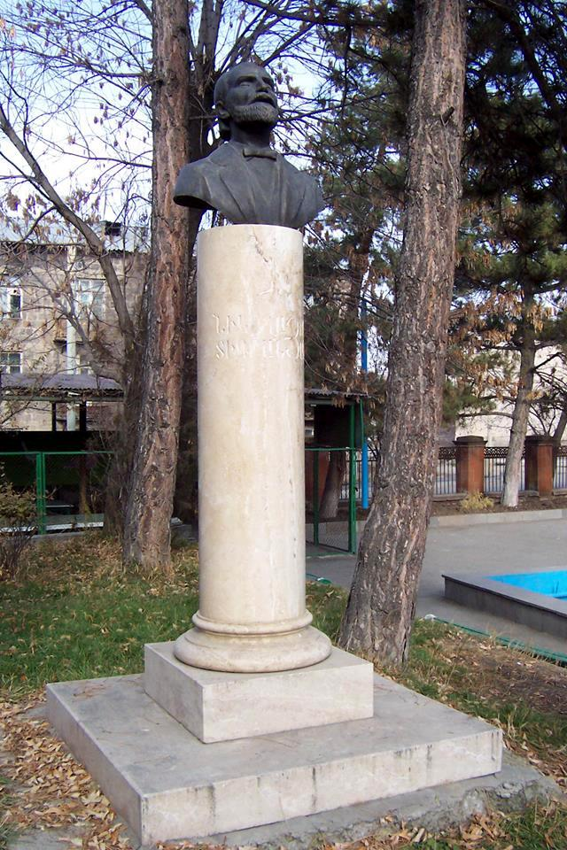 Քանդակագործ` Սամվել Պետրոսյան